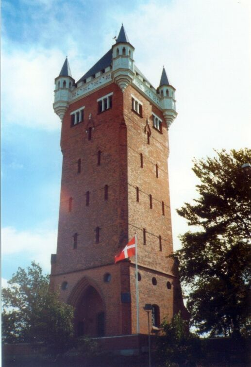 Wasserturm Esbjerg, Dänemark